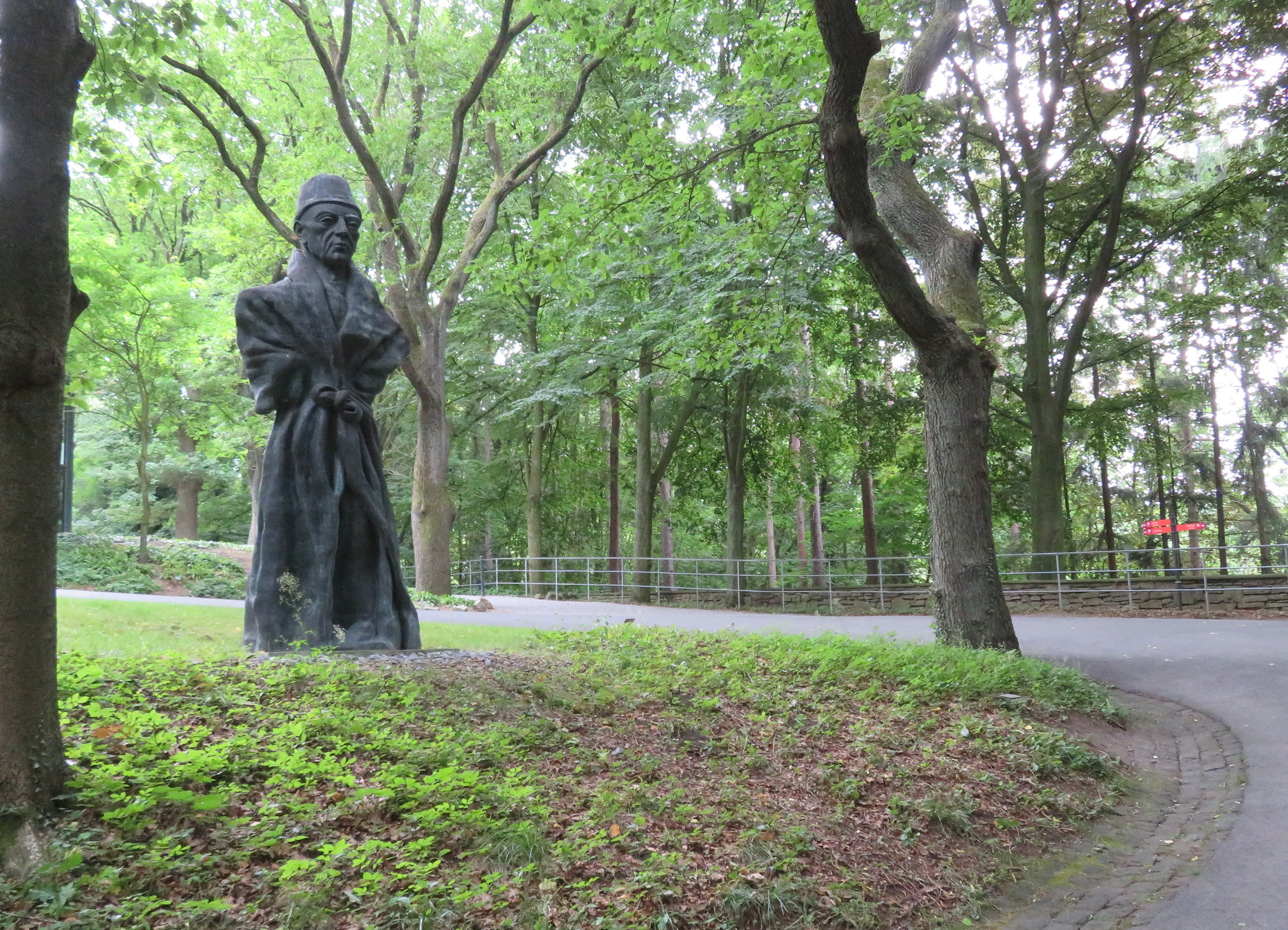 Skulpturenpark Waldfrieden Weg zum Eingang